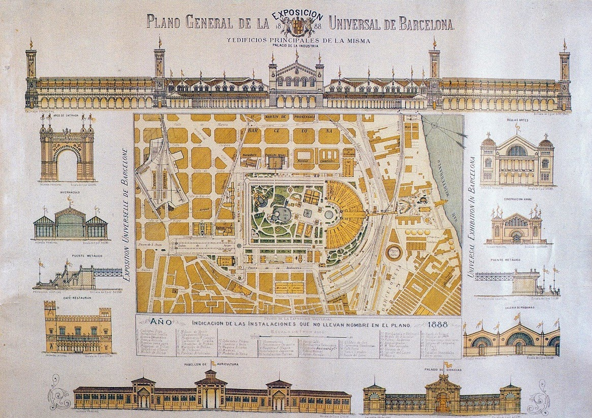 Plano de la Exposición de 1888 y edificios representativos.